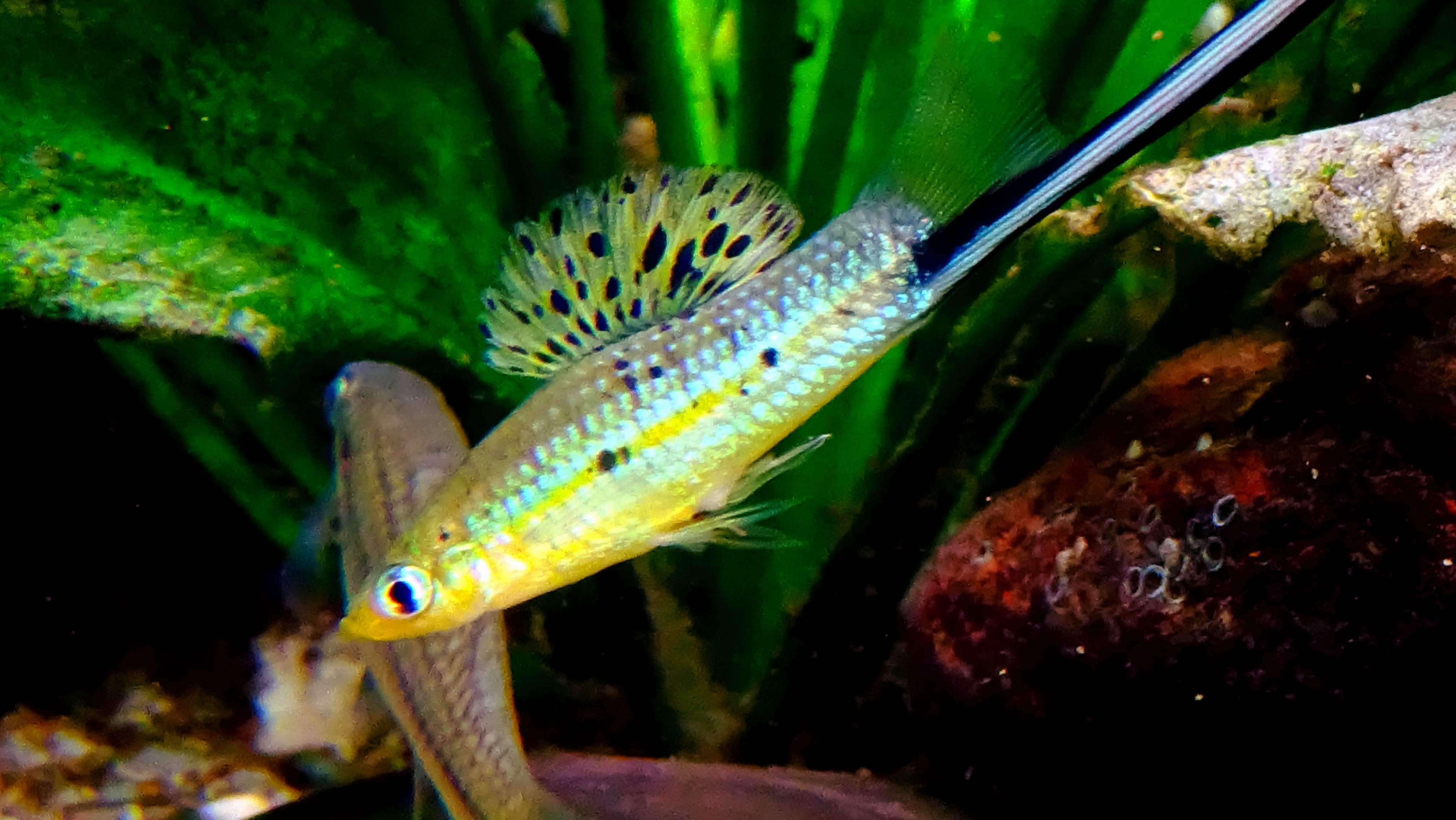 Xiphophorus montezumae (mâle) - Aquarium Tropical du Palais de la Porte Dorée - Paris/France - 29/04/2015